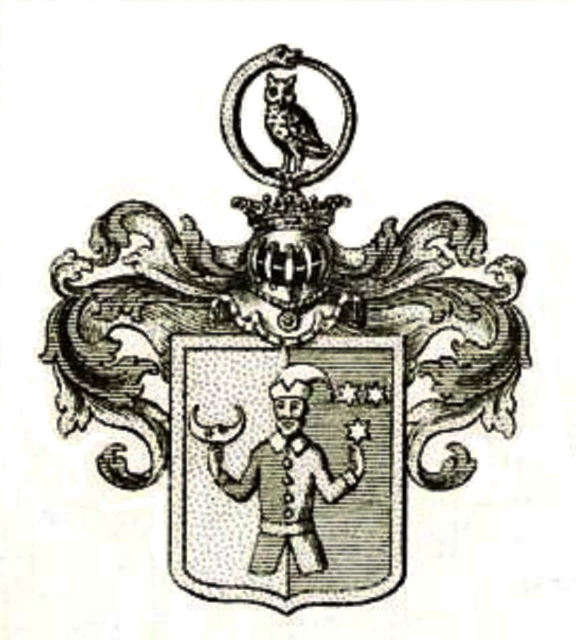 Wappen der aus dem Fränkischen stammenden, 1801 königlich preußisch geadelten Kretschmann („auf Erkersreuth“), wegen Gut Obertheres 1813 Eintragung in die königlich bayerische Adelsmatrikel